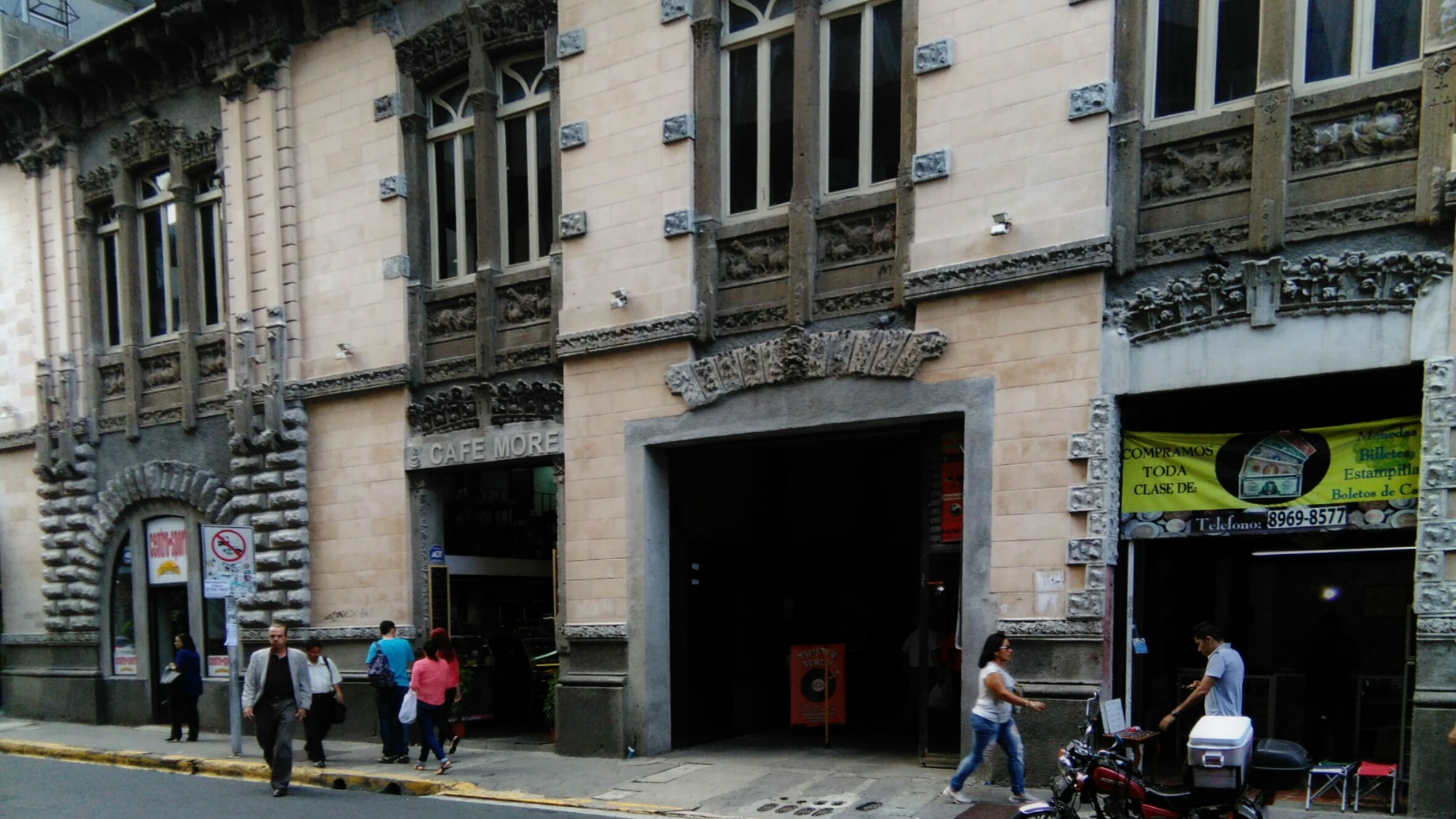 Edificio Steinvorth de San José